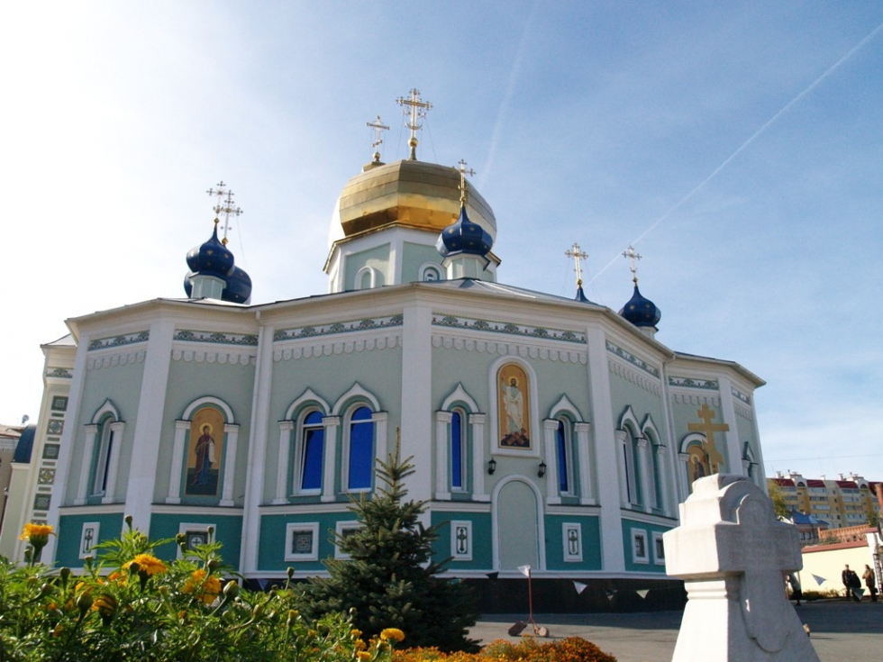 Свято-Симеоновский кафедральный собор, Челябинск, Russia